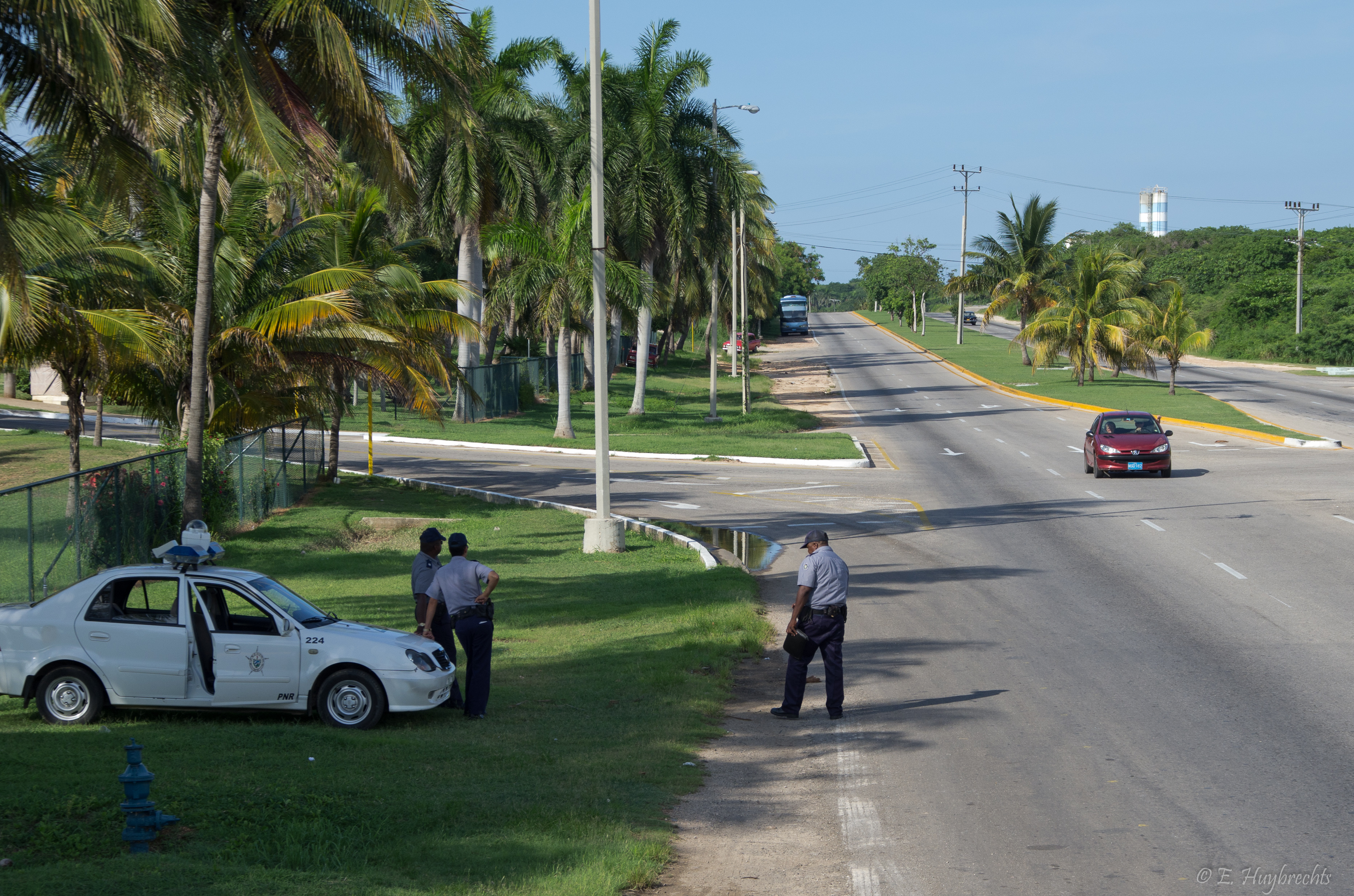 16 juillet 2011 (K5_01767)